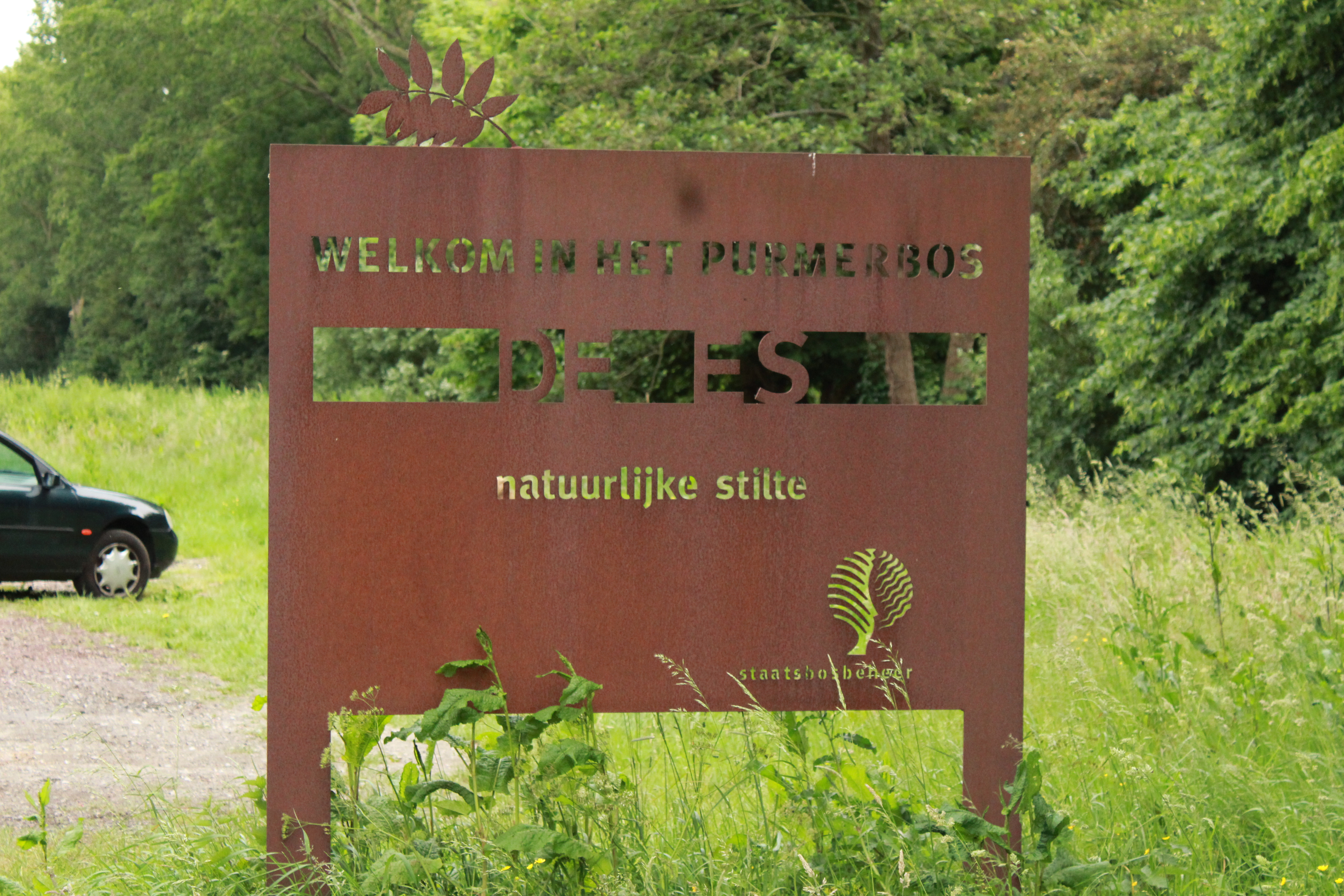 Een bord met daarop: "Welkom in het Purmerbos" "De Es", "natuurlijke stilte" en het symbool van staatsbosbeheer